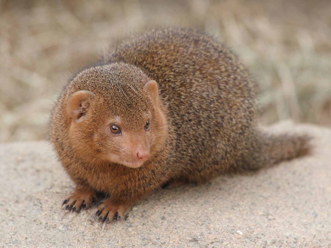 Dwarf mongoose (Helogale parvula) in Korkeasaari zoo